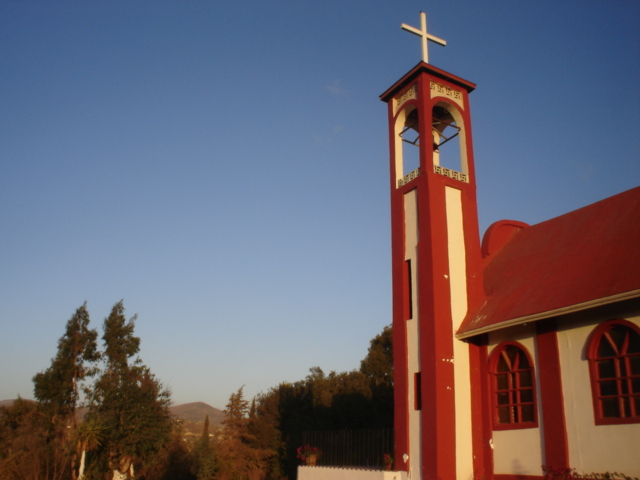 Eglise de San Antonio de las Minas - Basse Californie